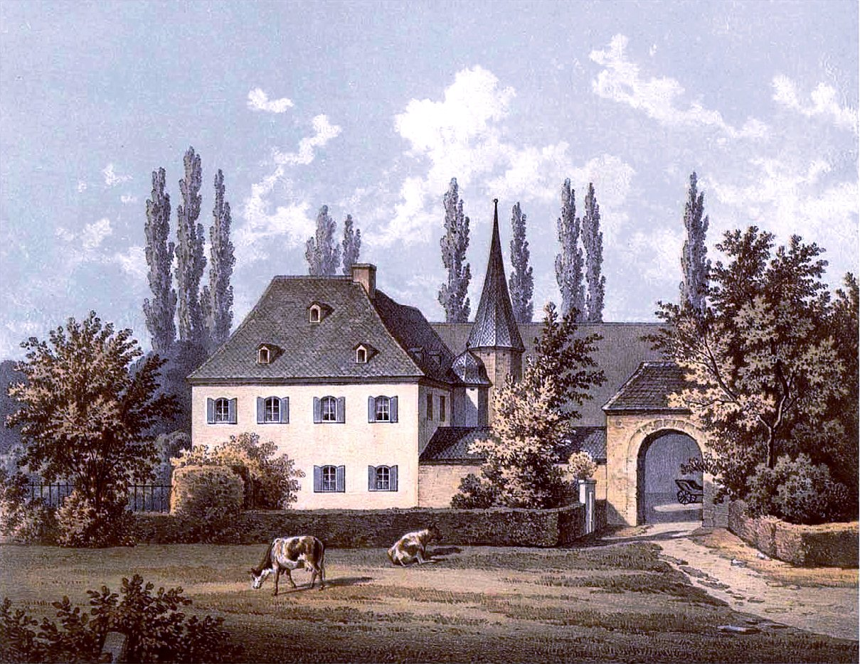 Haus Buslar, Landkreis Erkelenz, Rheinprovinz